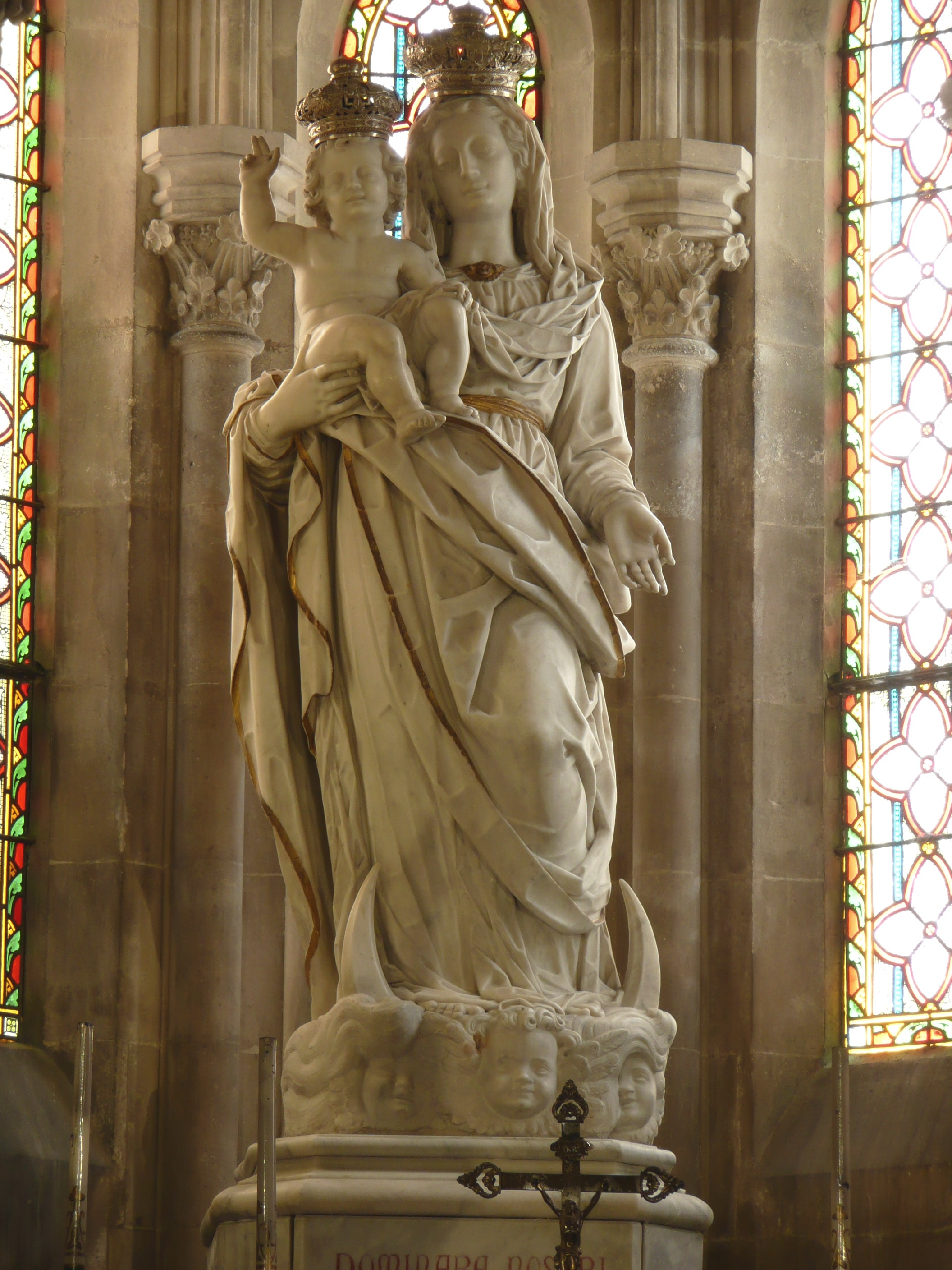 Arles (Bouches-du-Rhône, France), primatiale St Trophime, dans la chapelle absidiale axiale dite de la Vierge, statue du gênois Leonardo Mirano de 1619 provenant des Alyscamps.